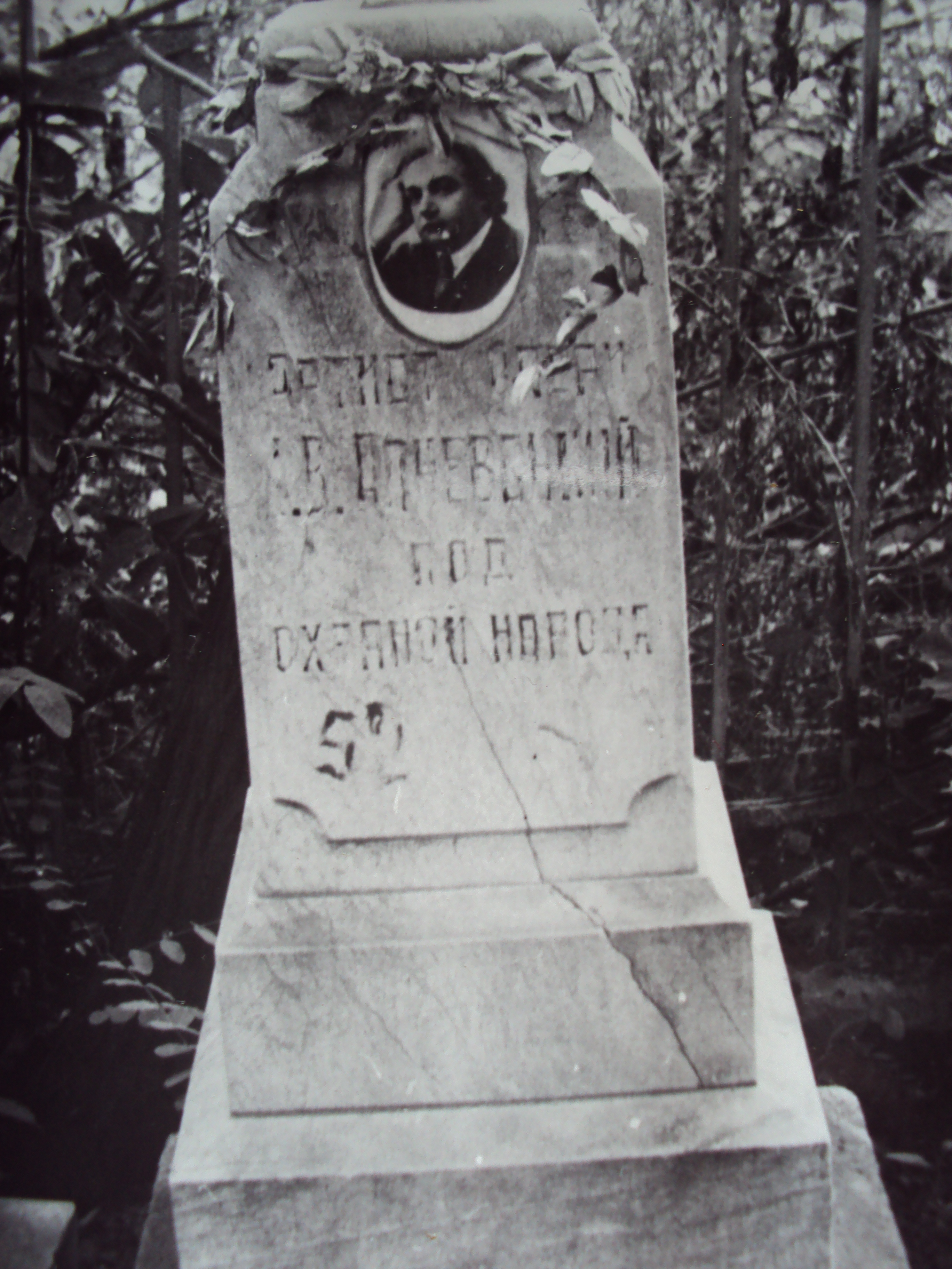 Поховання І.О.Алчевського у Харкові. Світлина з архіву родини Милославських